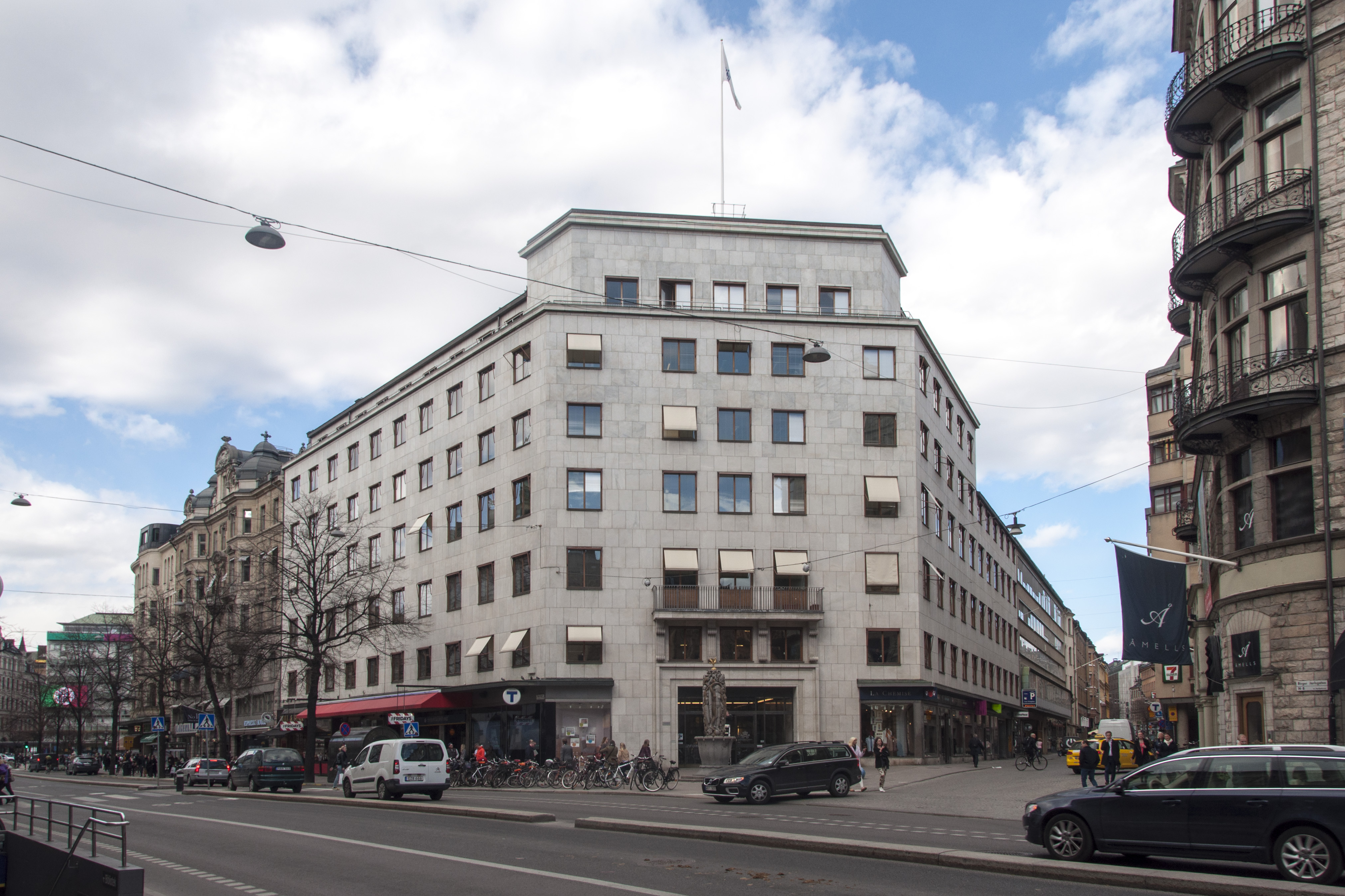 Sperlingens backe 47, Birger Jarlsgatan 16, Grev Turegatan 1, Nybyggnadsår 1935, Gustaf Clason (Arkitekt) Städernas Allmänna Brandstodsbolag (Byggherre) Zetterberg AB (Byggmästare)